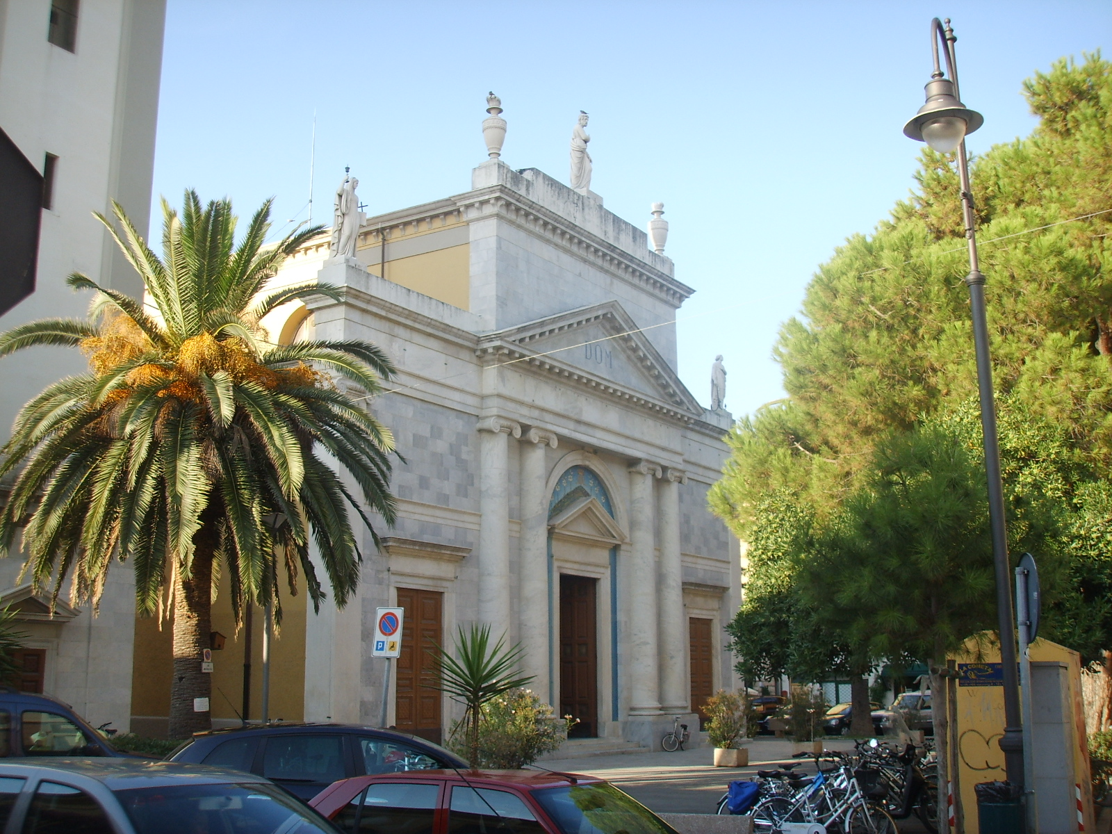 Viareggio, chiesa di sant'andrea, veduta